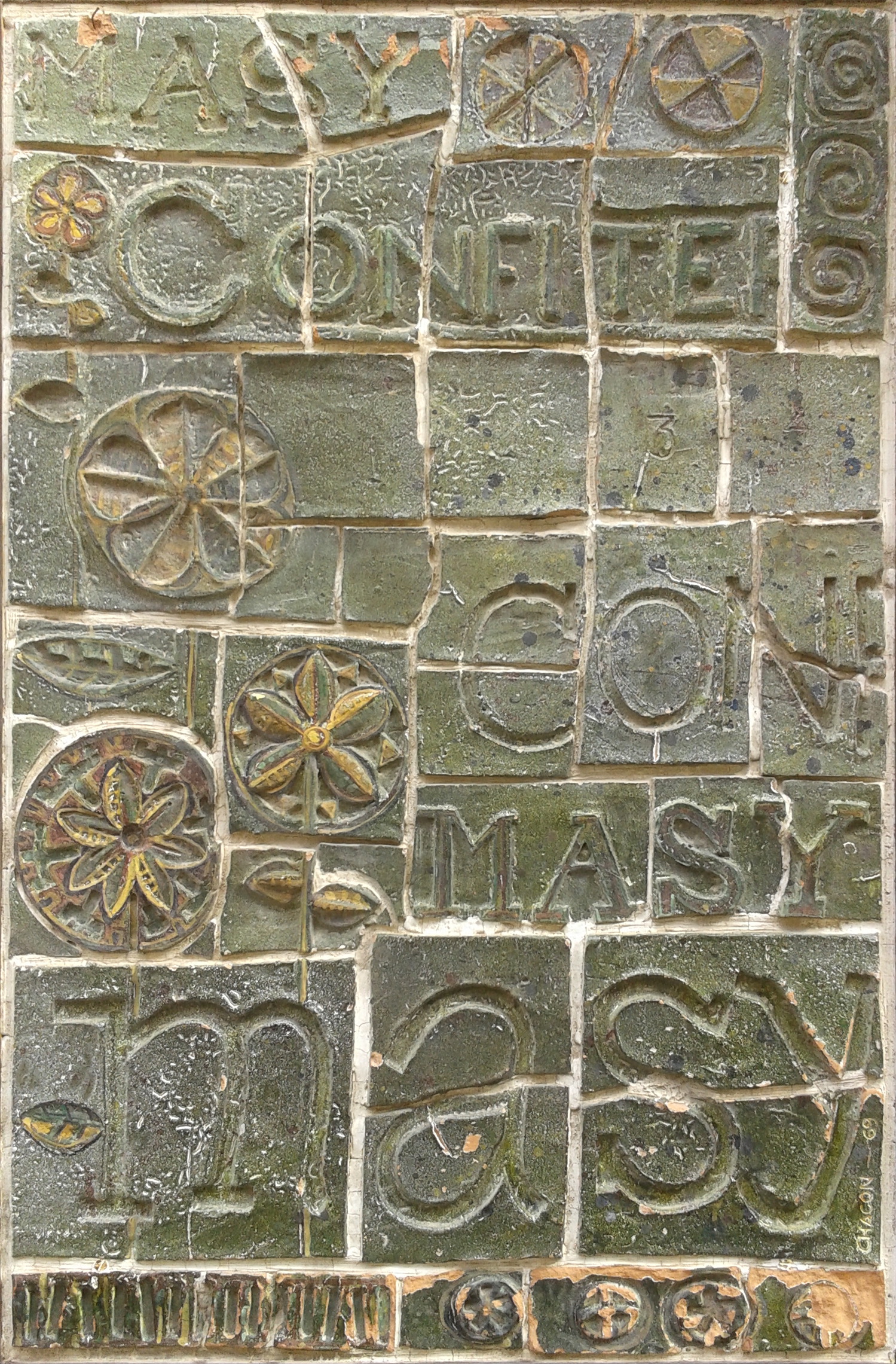 Cerámica artística de Carlos Chacón de 1969, situada en la fachada de una tienda en la calle Cervantes, número 10, de Alcalá de Henares. Incluye el texto "Confitería Masy".